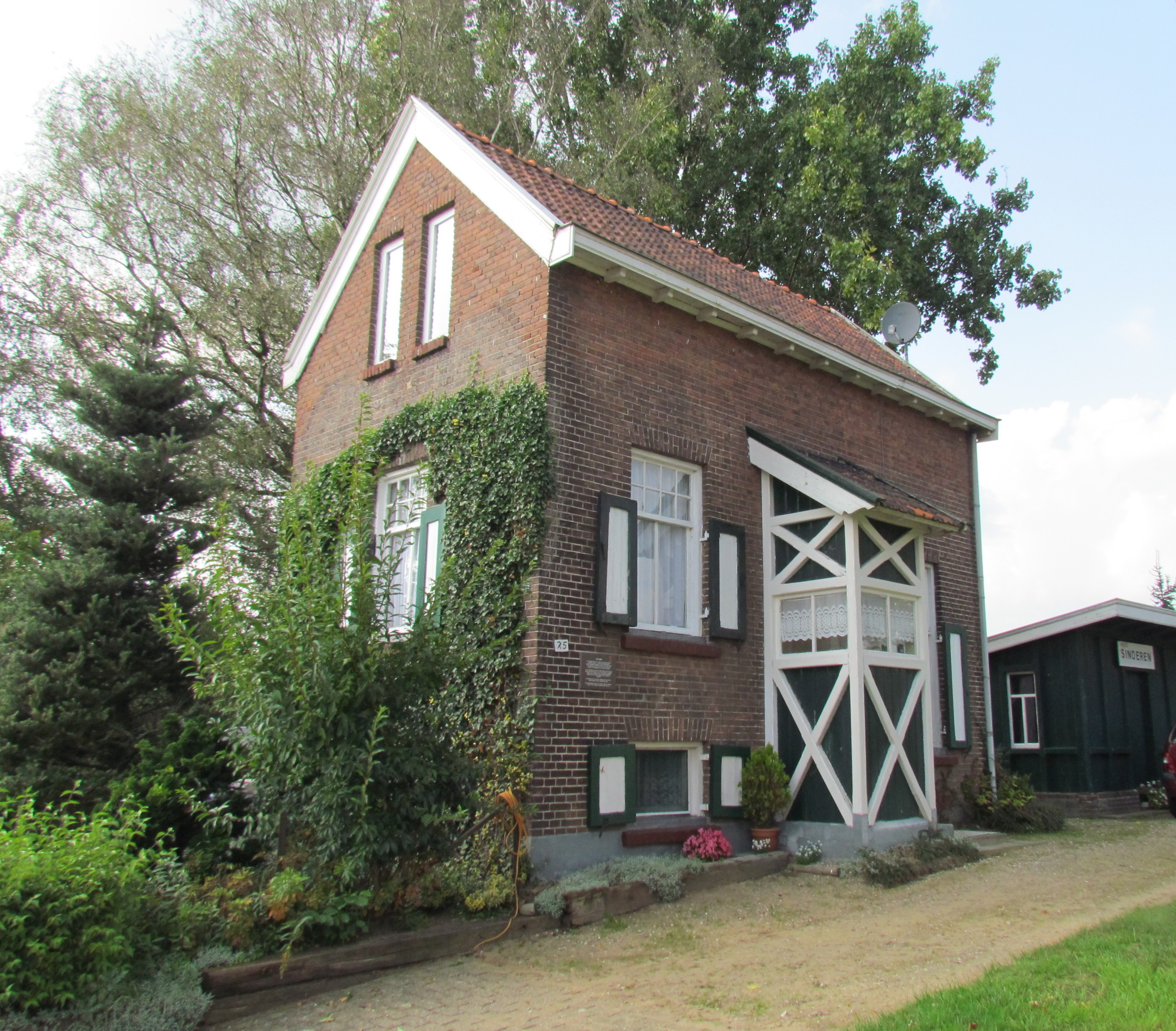 De Voormalige stopplaats Sinderen aan de spoorlijn Varsseveld - Dinxperlo